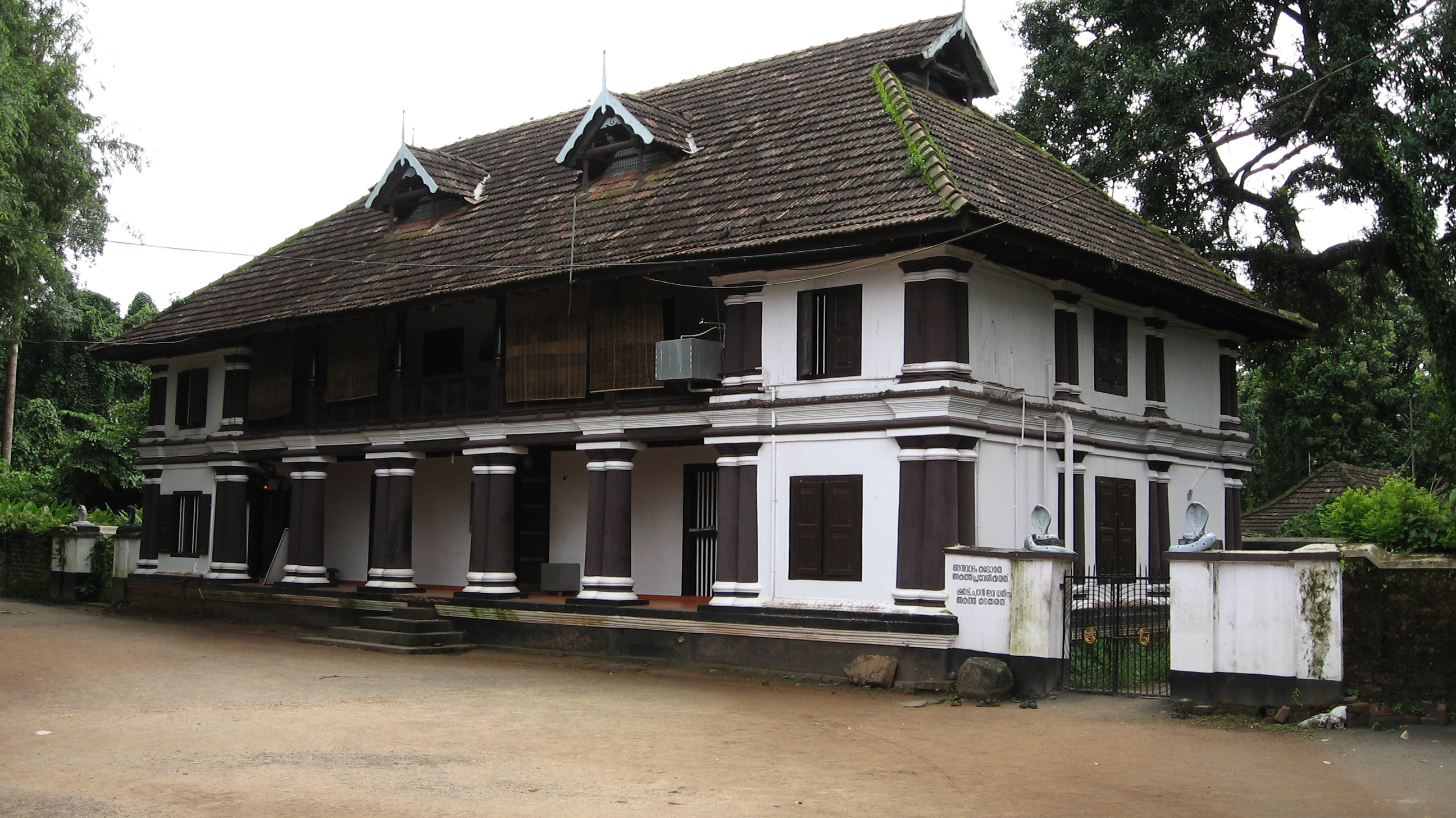 Padipura maalika of Mekkatmana